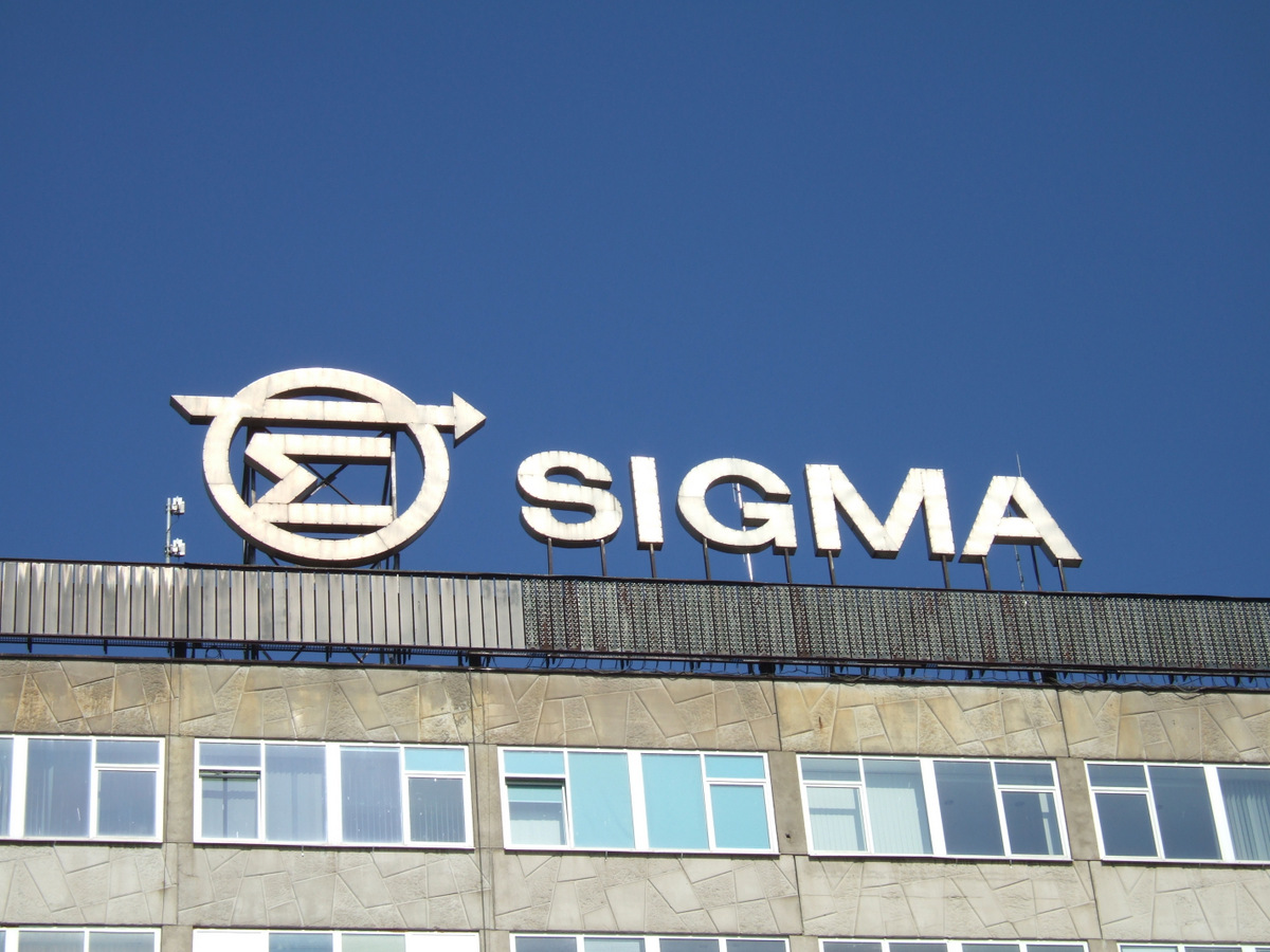 Gamybinio susivienijimo SIGMA iškaba